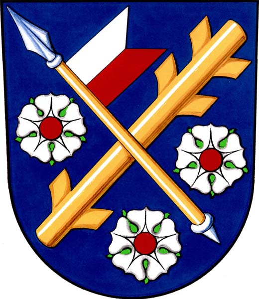 Znak obce Dolní Krupá (okres Mladá Boleslav)